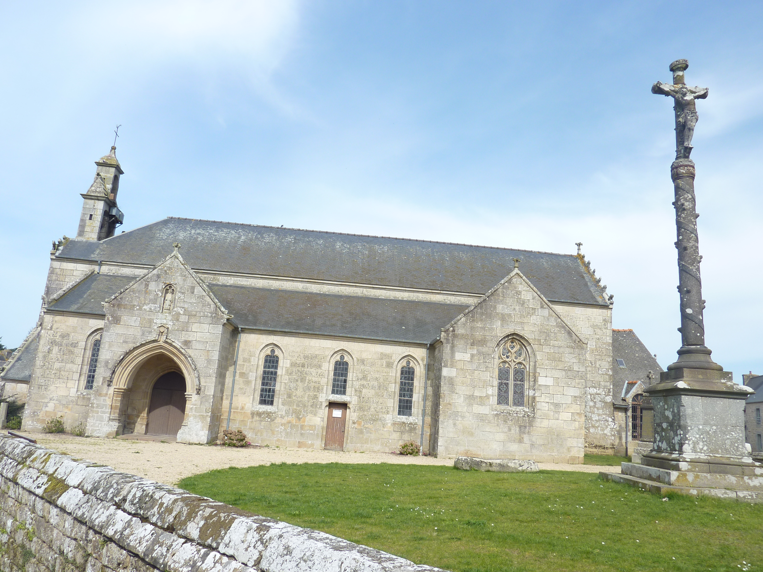 Trégrom : l'église Saint-Brandan et le calvaire